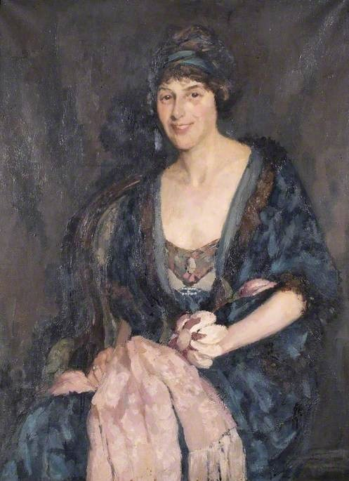 Vrouw in blauwe jurk (jaren 20) in het Windsor & Royal Borough Museum